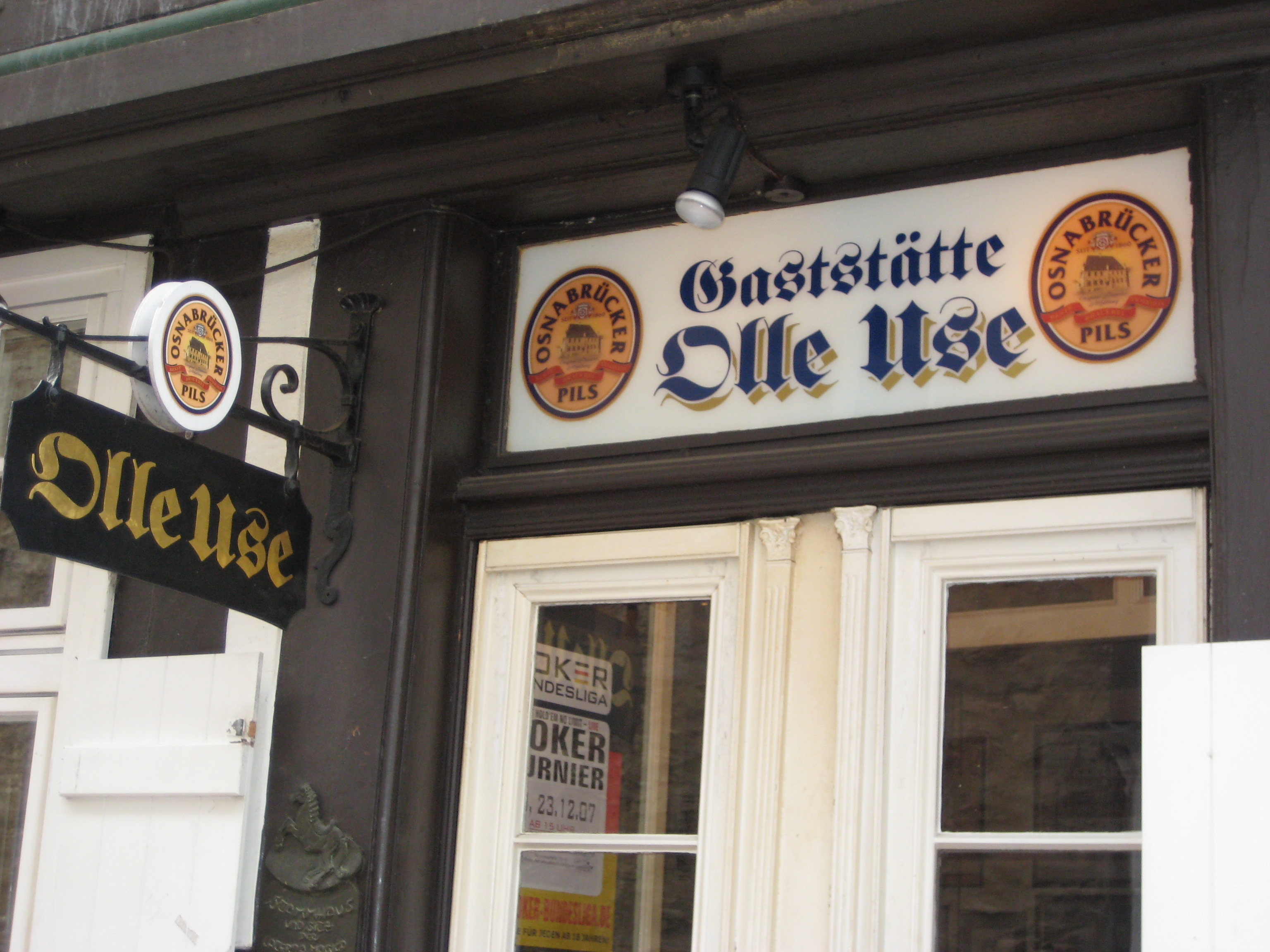 Gaststättenbeschriftung "Olle Use". Die Traditionsgaststätte in Osnabrück verwendet die Begrüßung der Schnatgangsteilnehmer der Heger Laischaft als Namen.